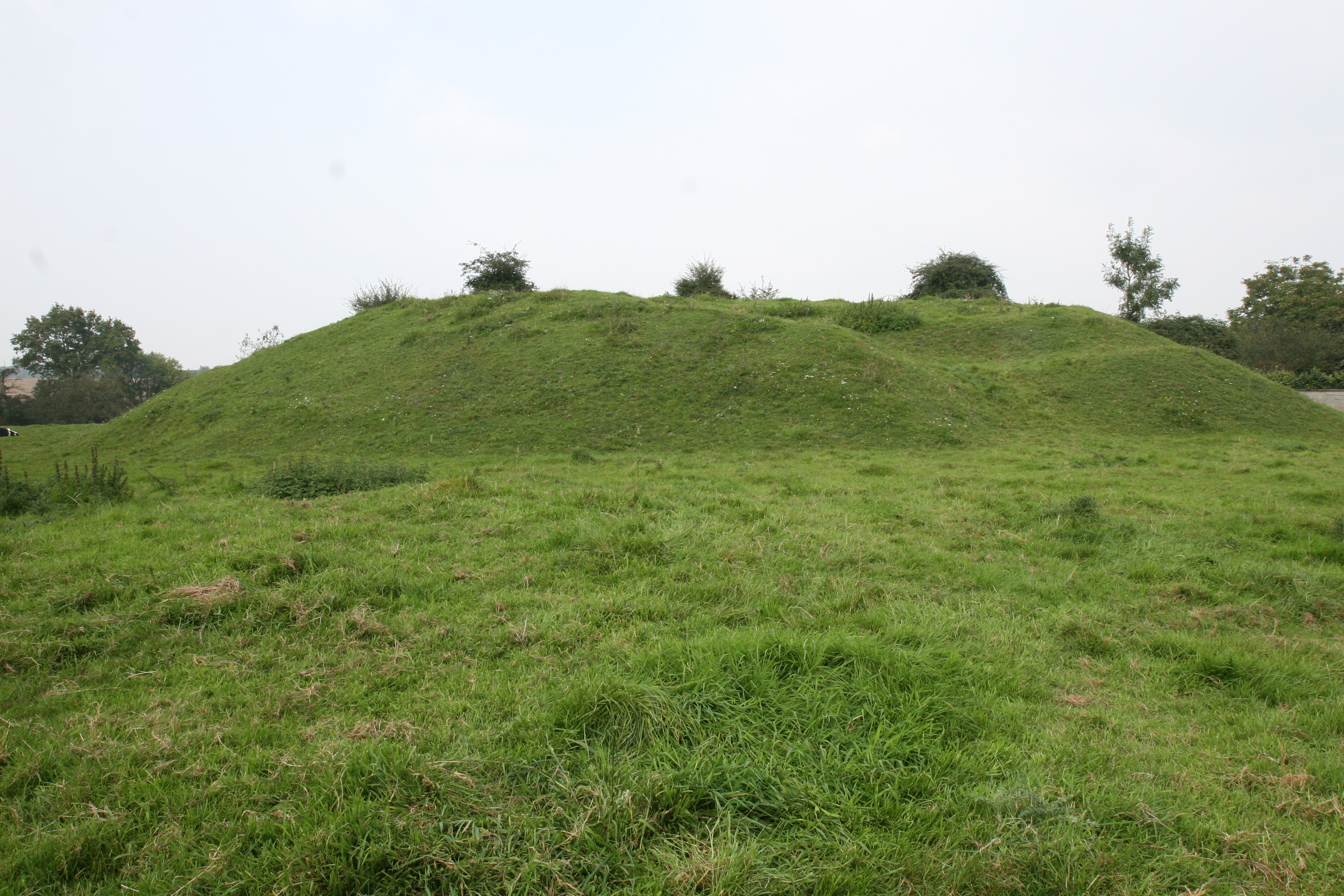 La butte de Béthencourt-sur-Mer, Somme, France.